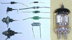 жартылай өткізгіш және лампылы диод